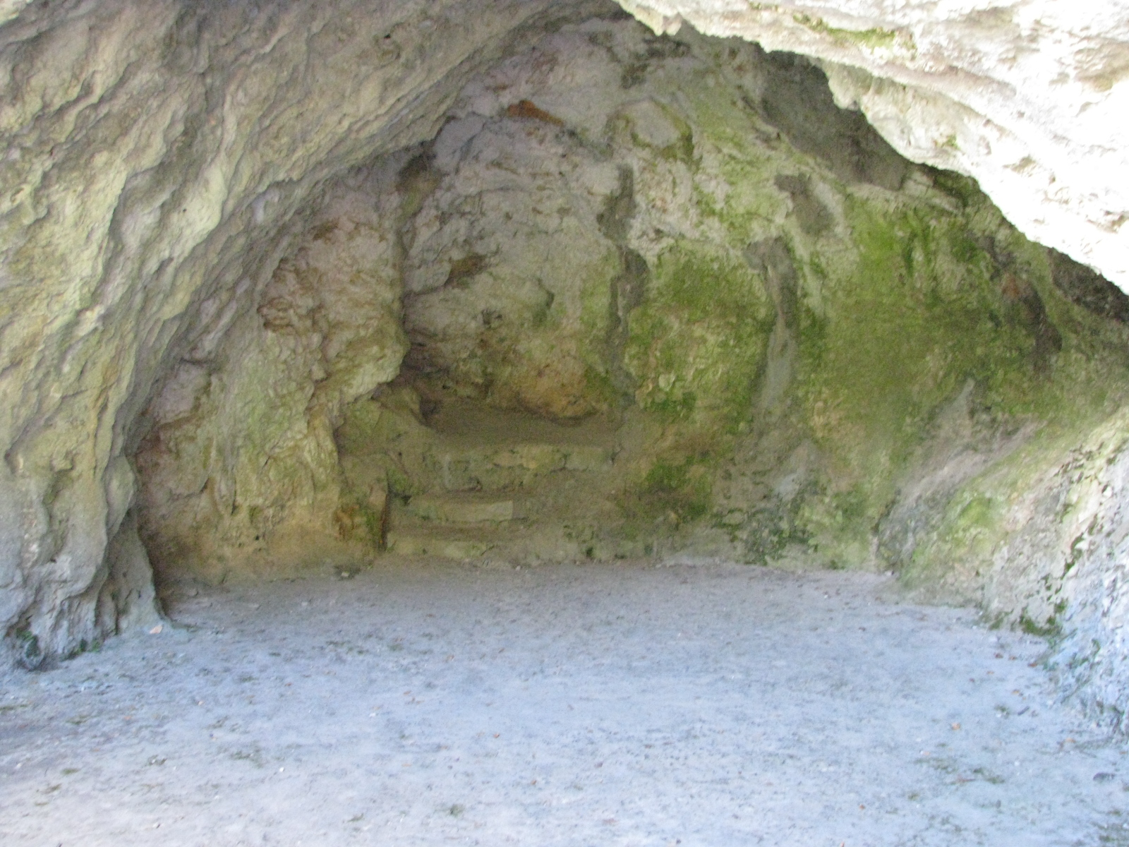 Unutrašnjost Titove šilje na Visu